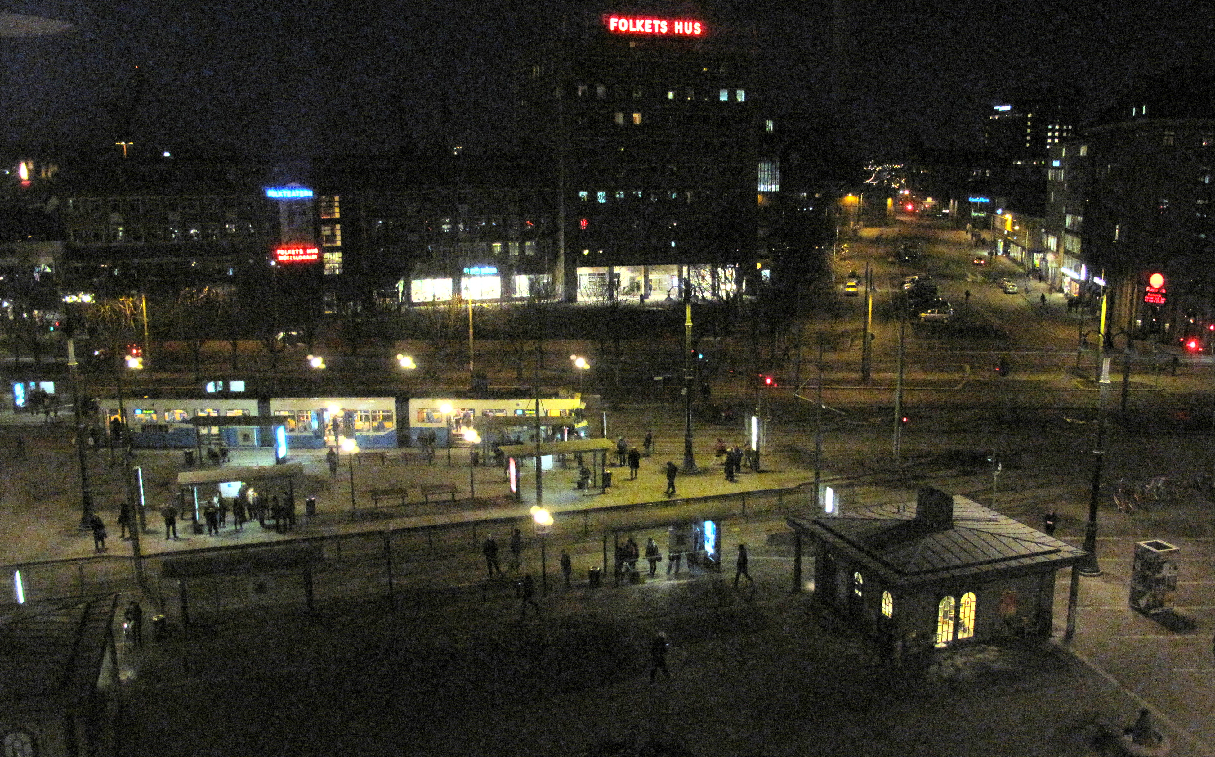 Järntorget i Göteborg från ovan på kvällen. Upplättad och beskuren bild.